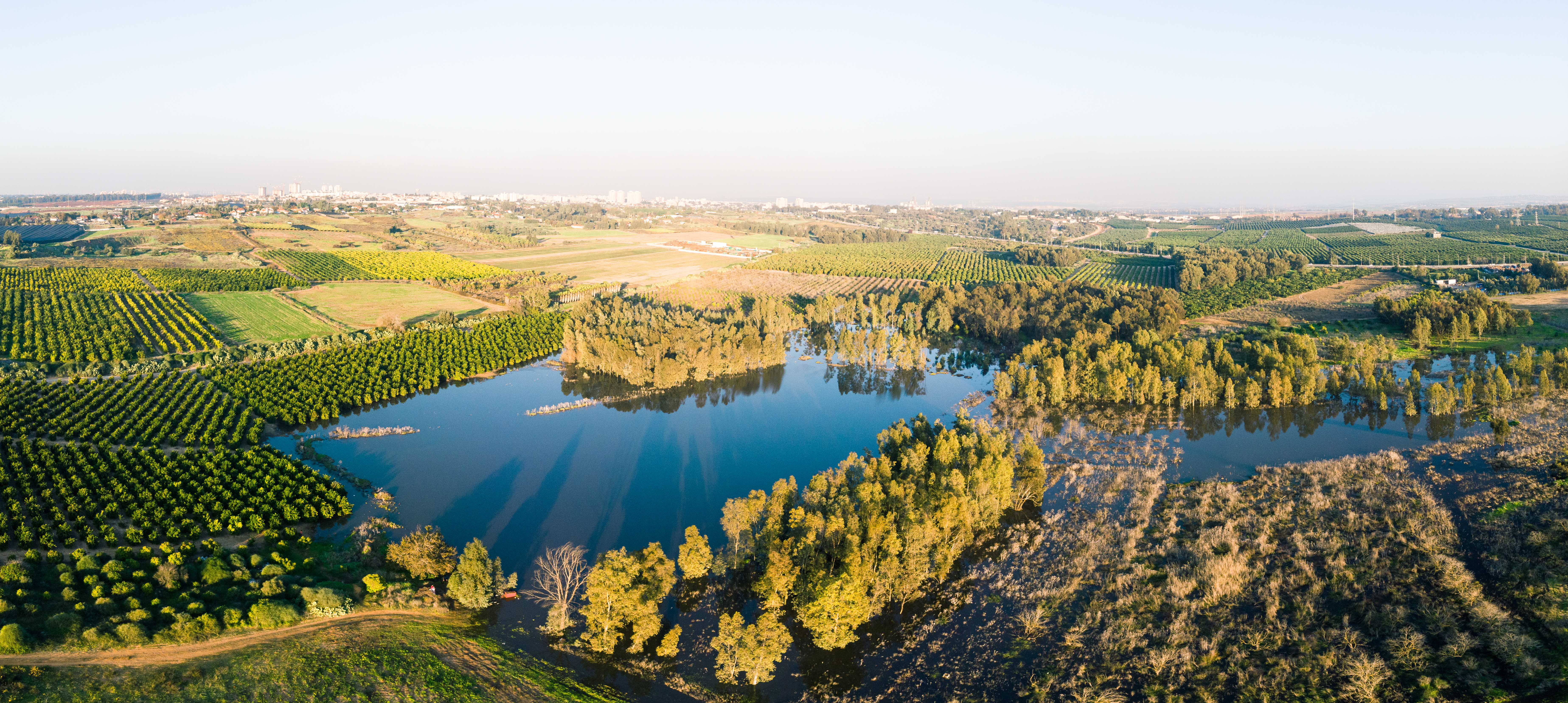 בריכת החורף של רחובות בשיאה מהאוויר, צולם בדצמבר 2018